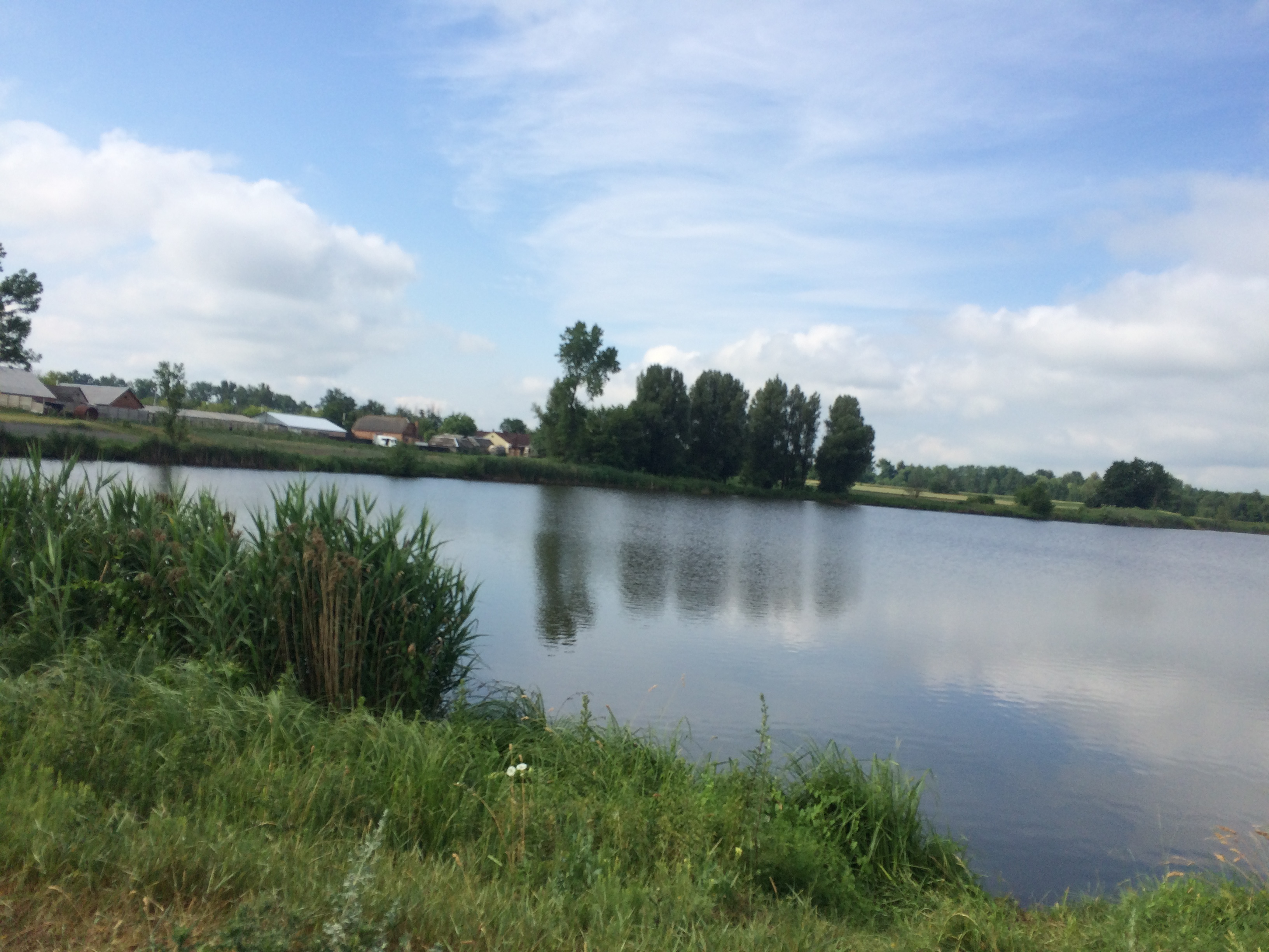 Вигляд на село Сьомаки з боку штучного ставка на р.Кодненка.